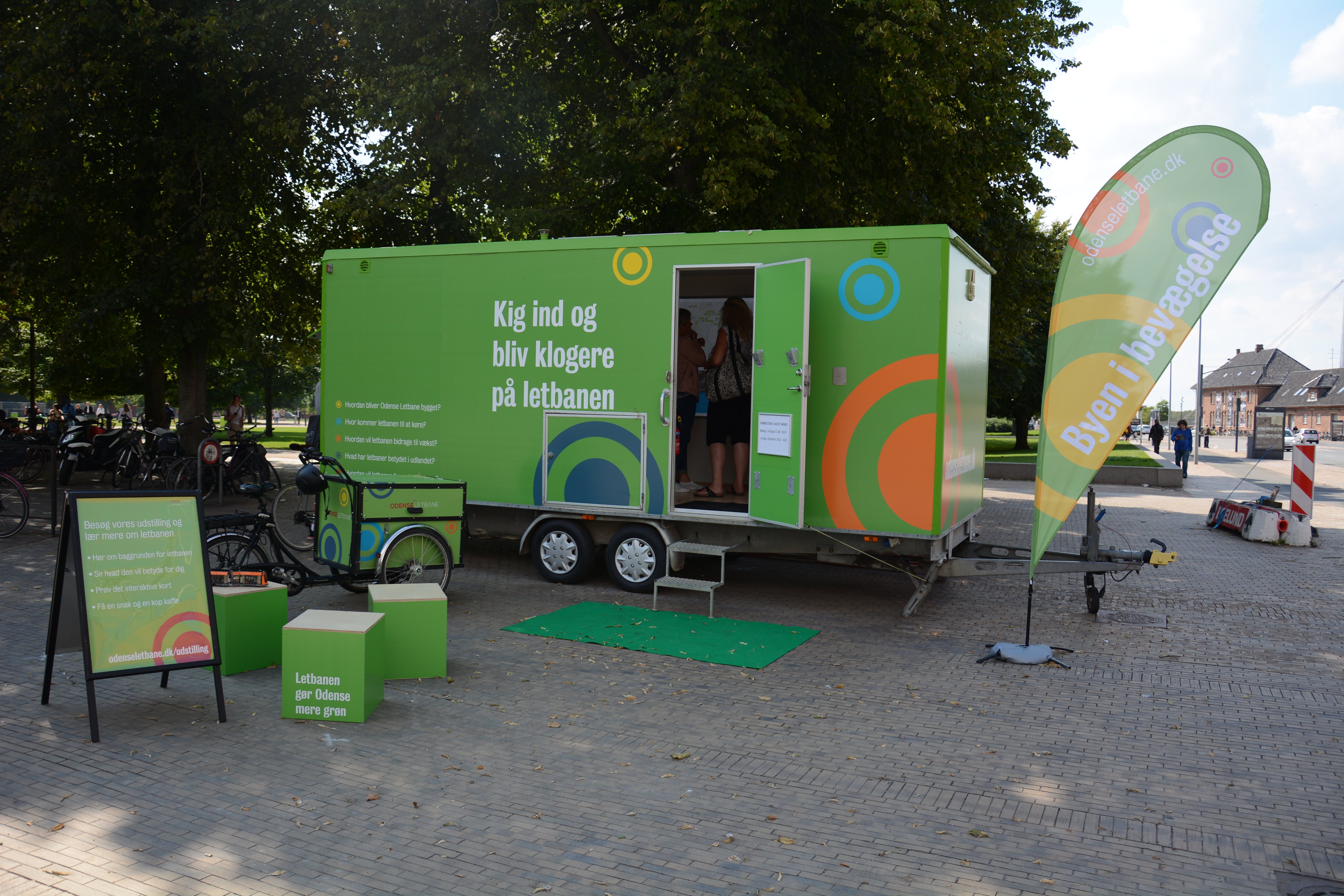 Mobil udstilling om letbanen på Banegårdspladsen